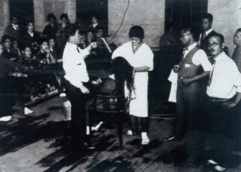 Miyoka Shibayama's Hairdresser seminar